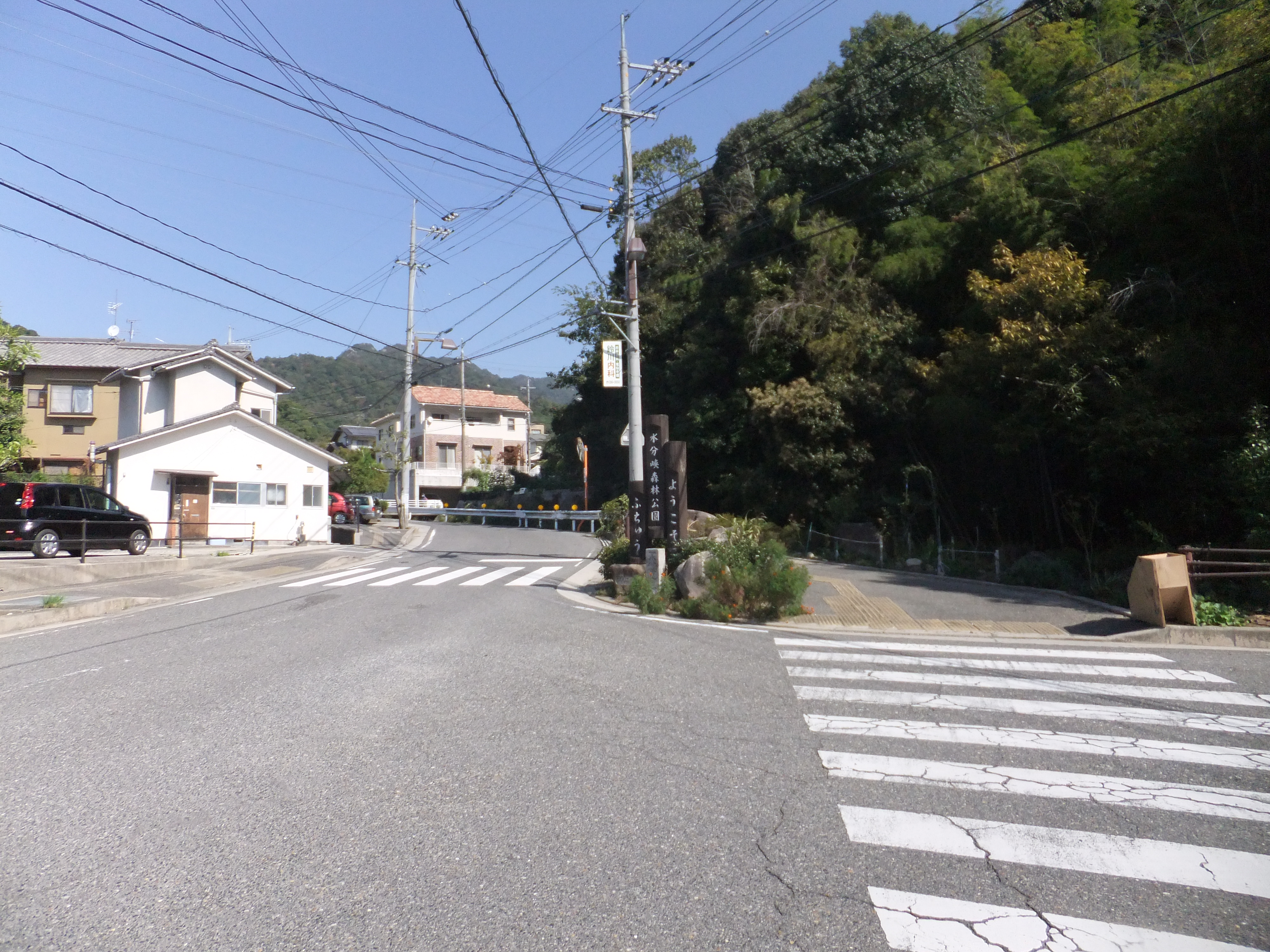 水分峡森林公園